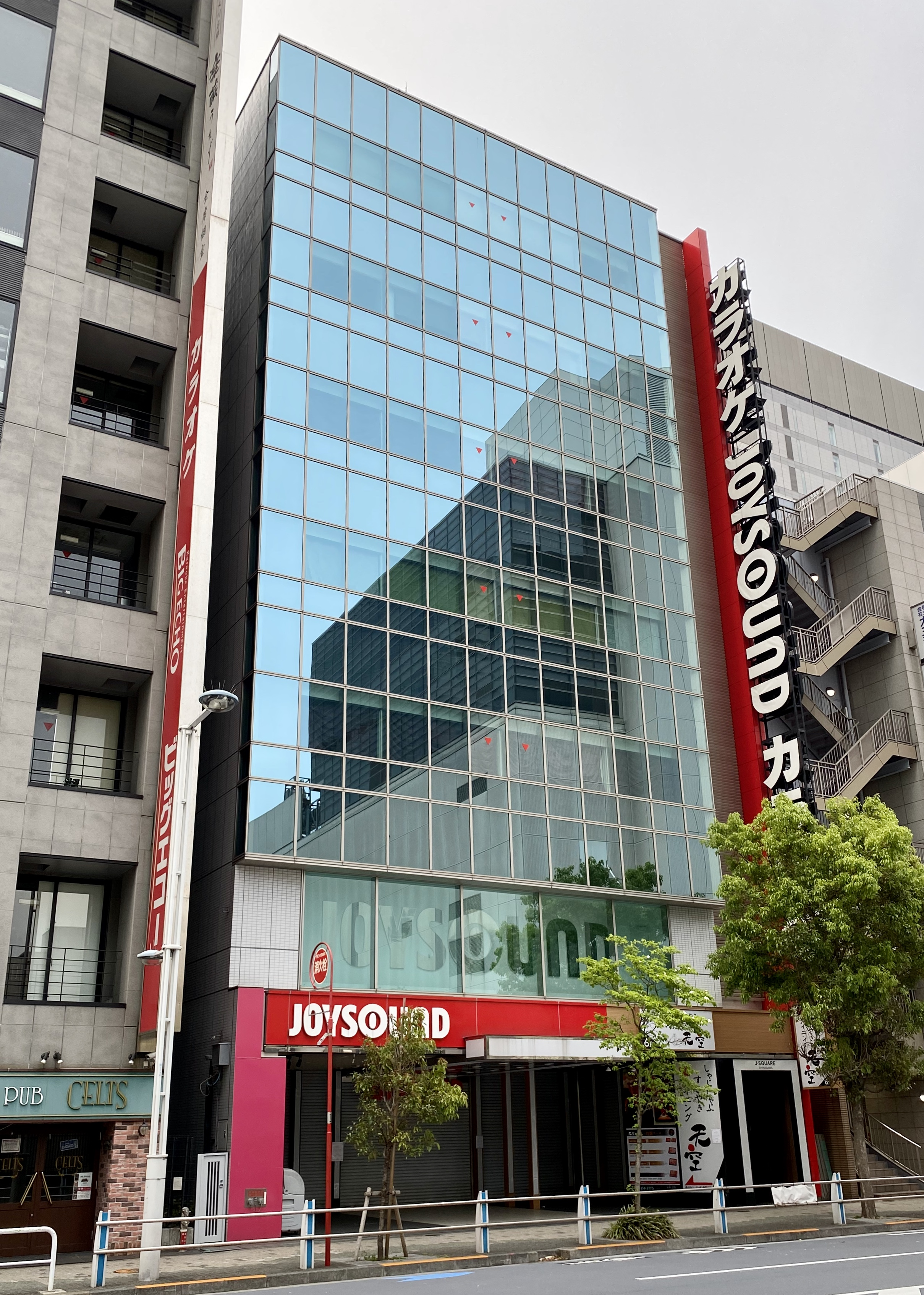 JOYSOUND品川港南口店